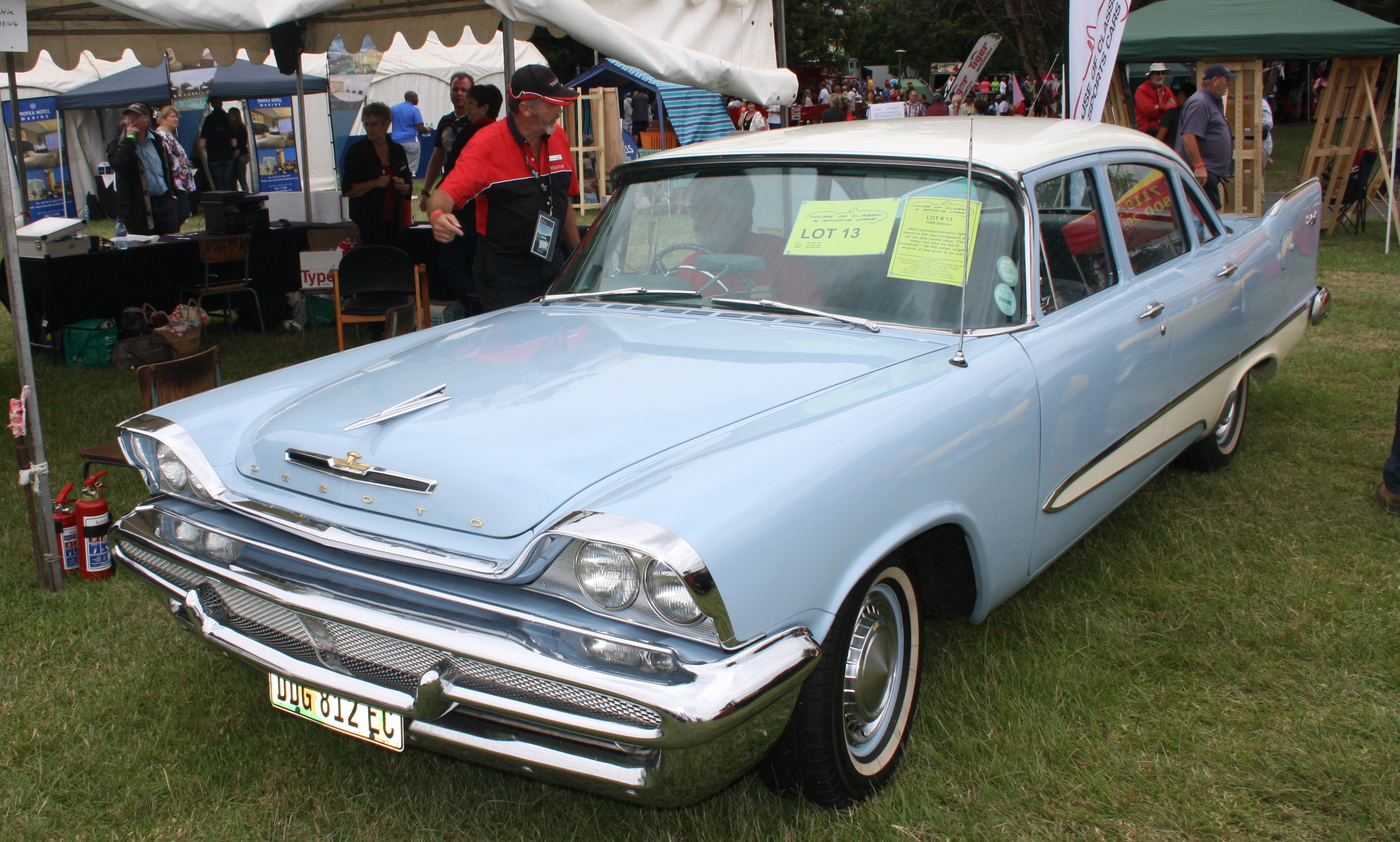 1958 DeSoto Diplomat